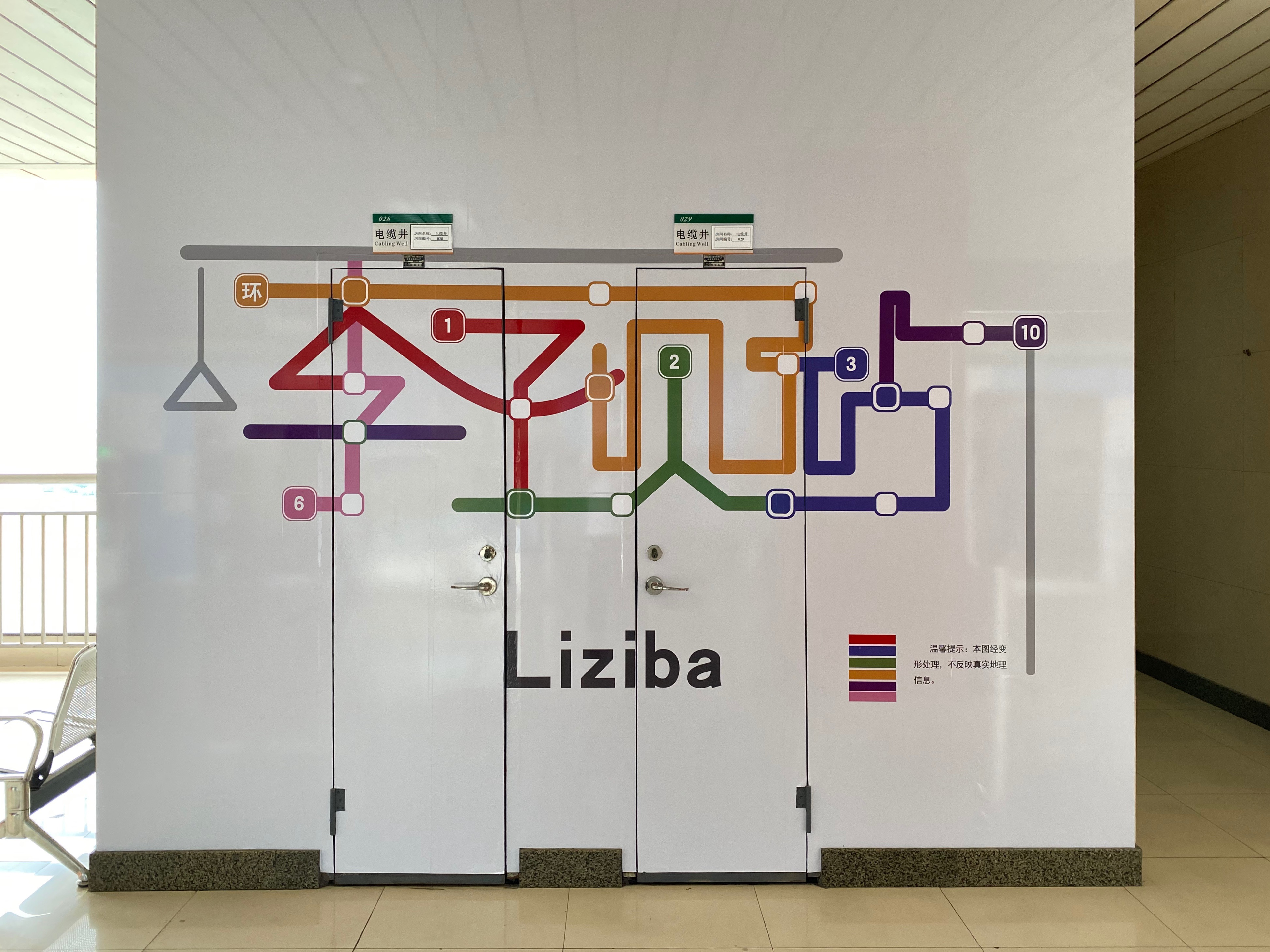 中文（中国大陆）: 李子坝站于 2020 年 5 月启用的艺术版站名墙，使用了 1、2、3、6、10、环线（与实际走向基本上没有关系）构成「李子坝站」四字。在鱼洞至较场口侧站台，还有同样设计的「重庆」图案。